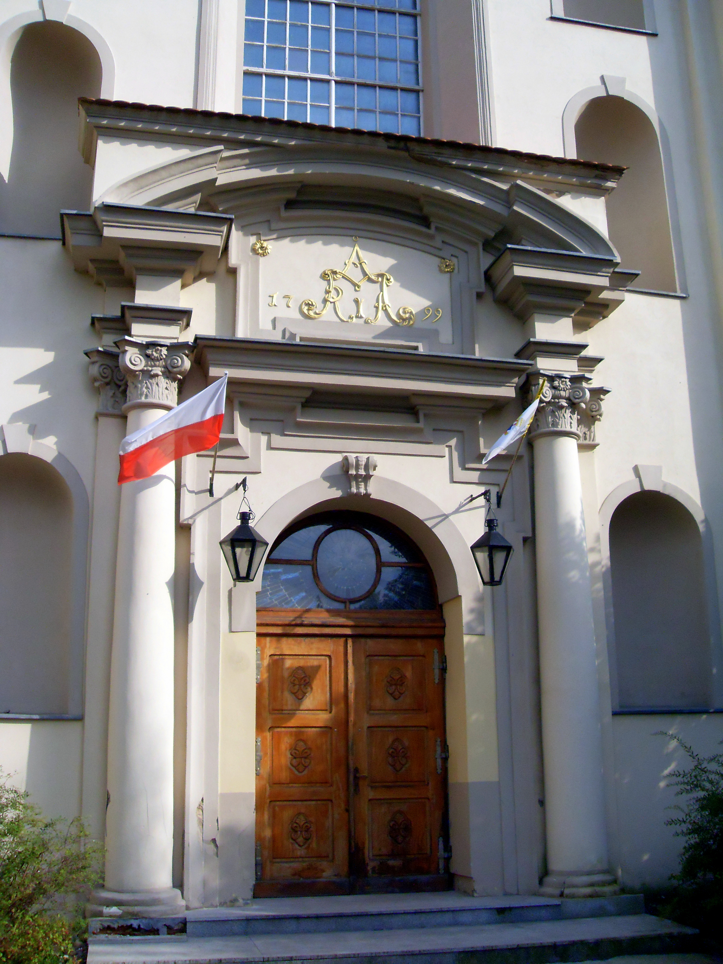 Klasztor w Wągrowcu. Wejście główne do kościoła